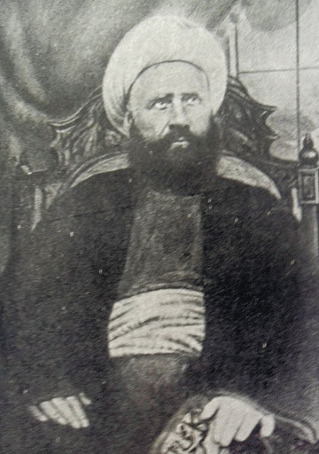 Molla Ruhulla Axundov